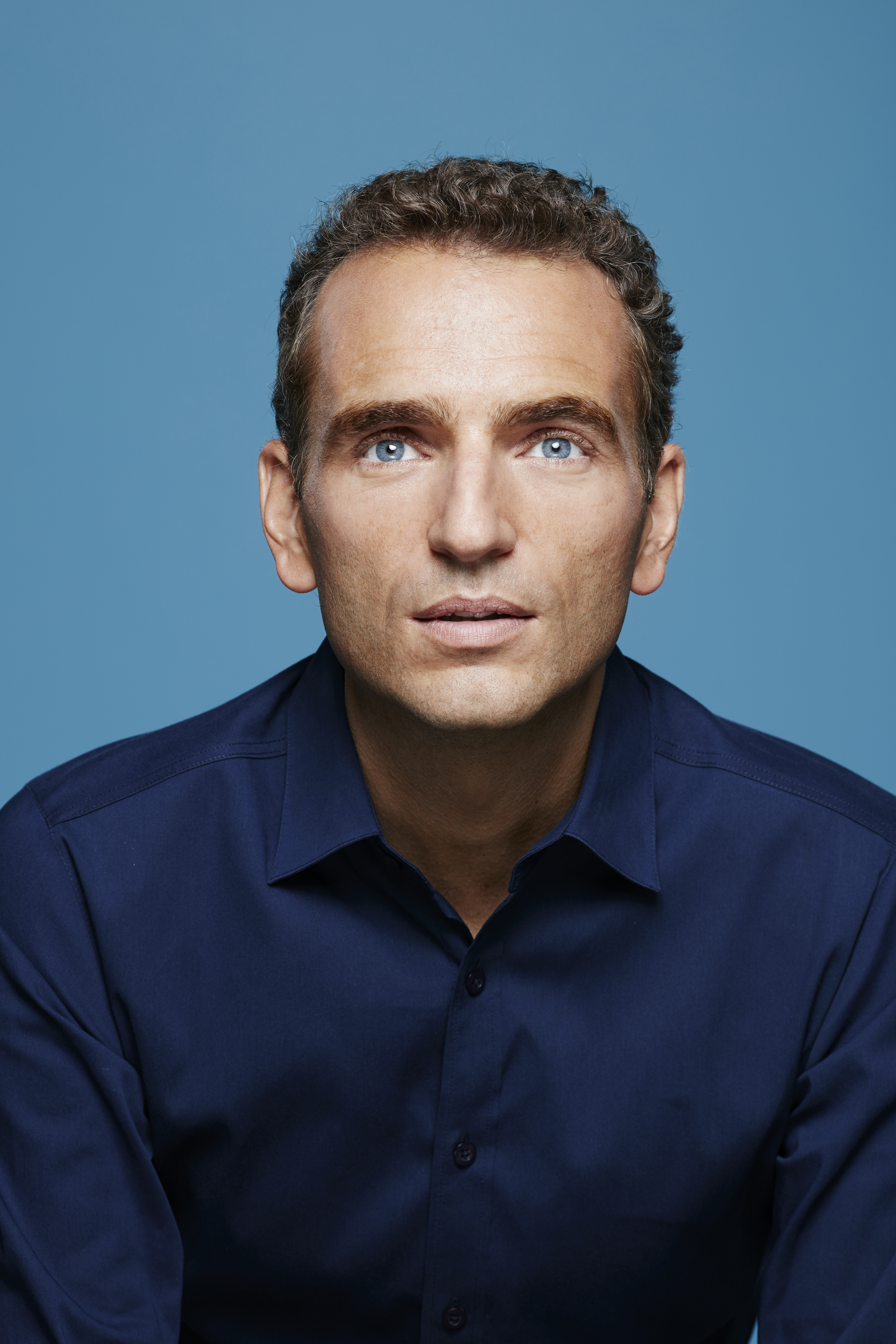 Portrait d'Alexandre Mars en 2016